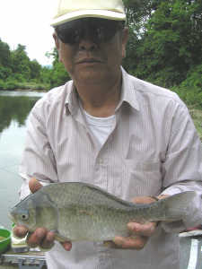 ヘラブナ釣り・釣果